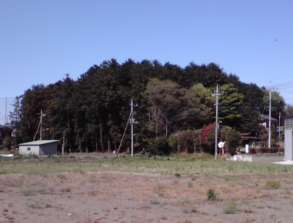 伝源経基館跡(埼玉県鴻巣市大間)の全景。西側の平地より撮影。